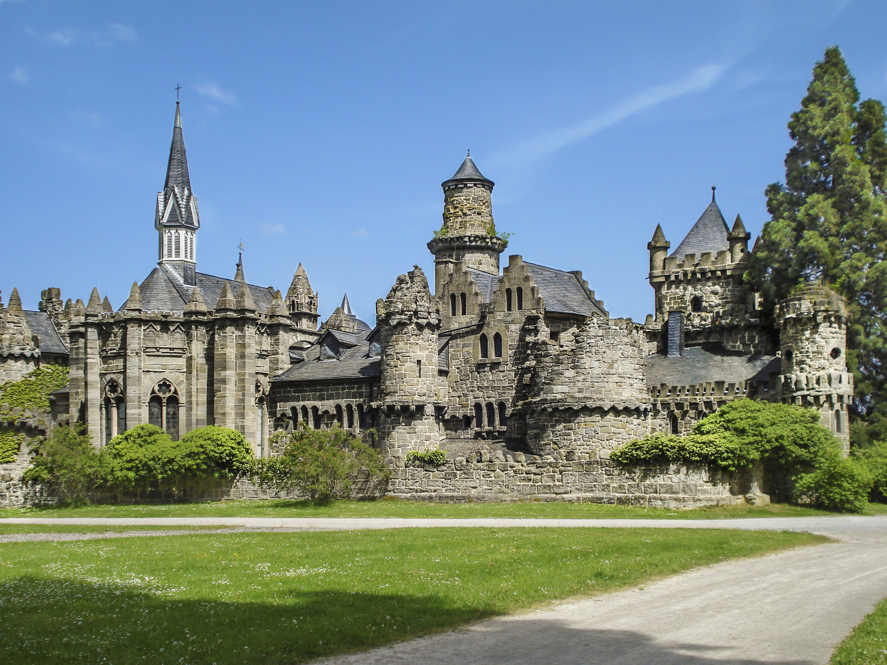 Die "Löwenburg" bei Kassel, Westseite